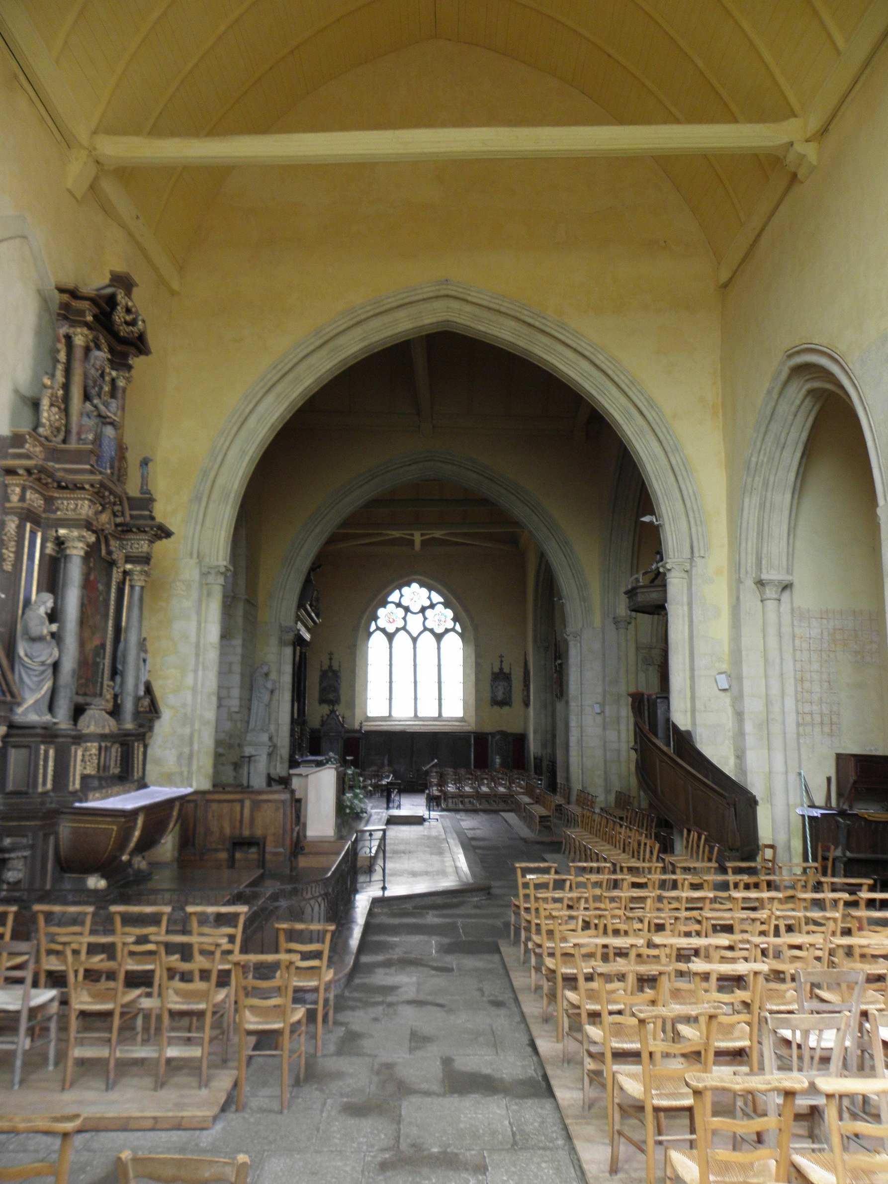 Vue vers le septentrion du transept de l'abbatiale de Saint-Méen-le-Grand (35). .